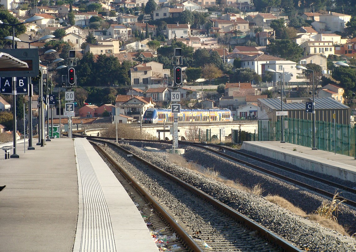 La sortie sud de la gare de Saint-Antoine : les voies B et C sont rabattues sur la voie A, juste avant l'entrée sur le viaduc des Aygalades (on aperçoit une rame TER sur le viaduc).